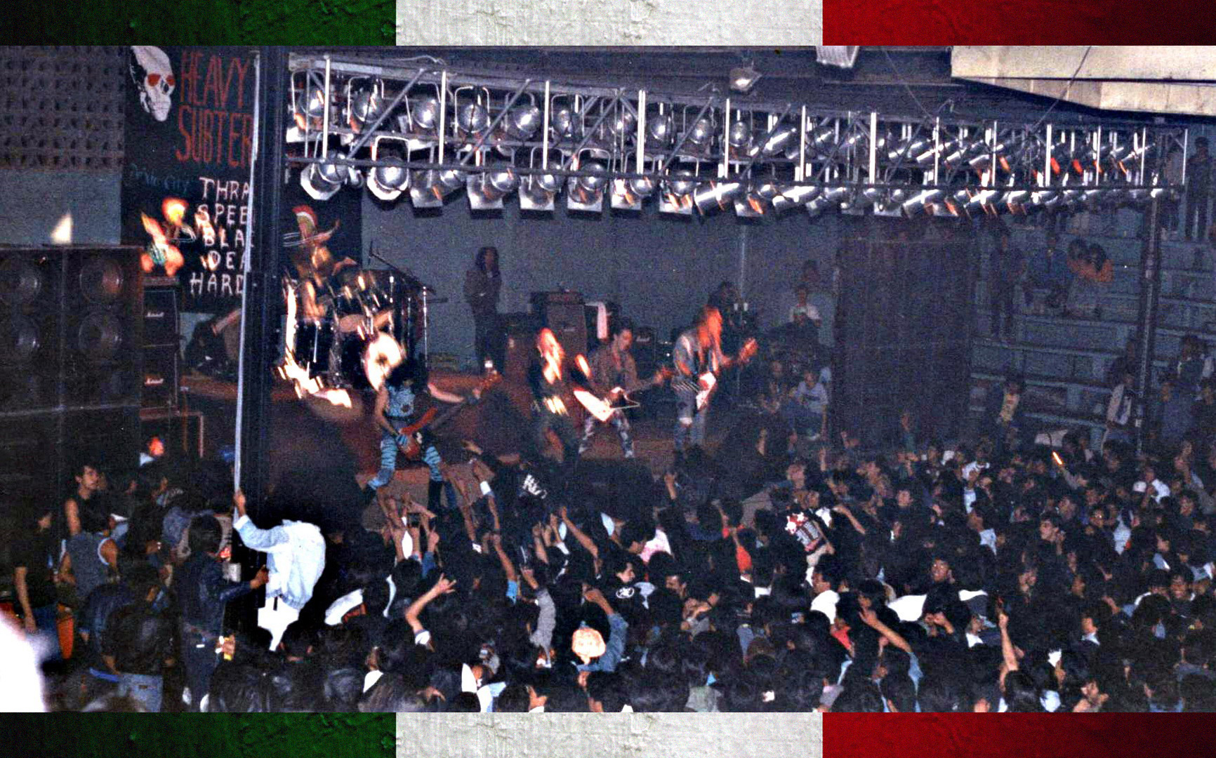 Primeros conciertos de Ángeles del infierno en Mexico DF 3ªFormación: Carlucho, Santi, Juan, Manu, Robert - 1990